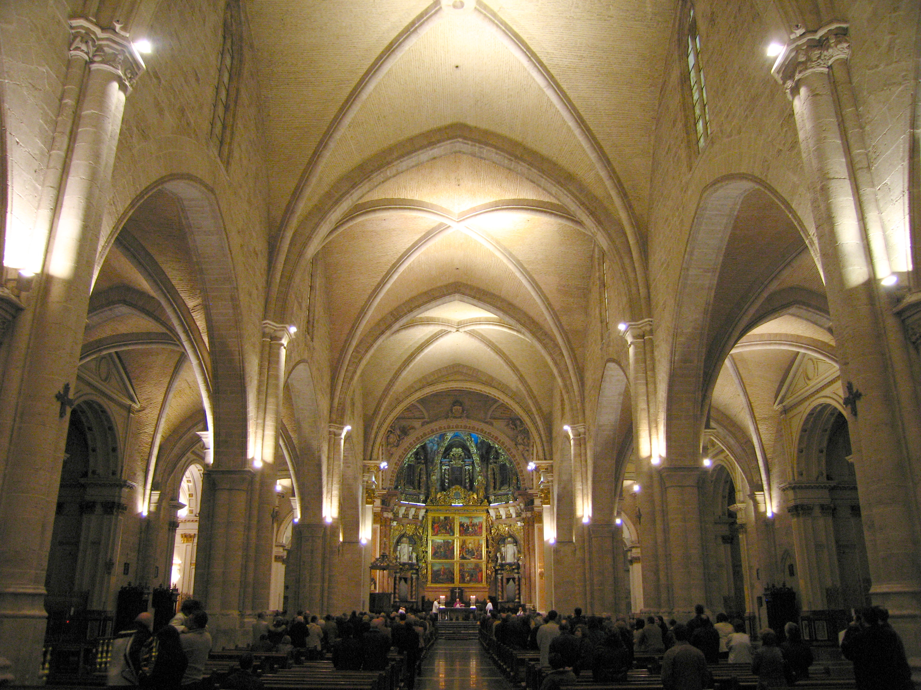 Nau Central de la Seu de València